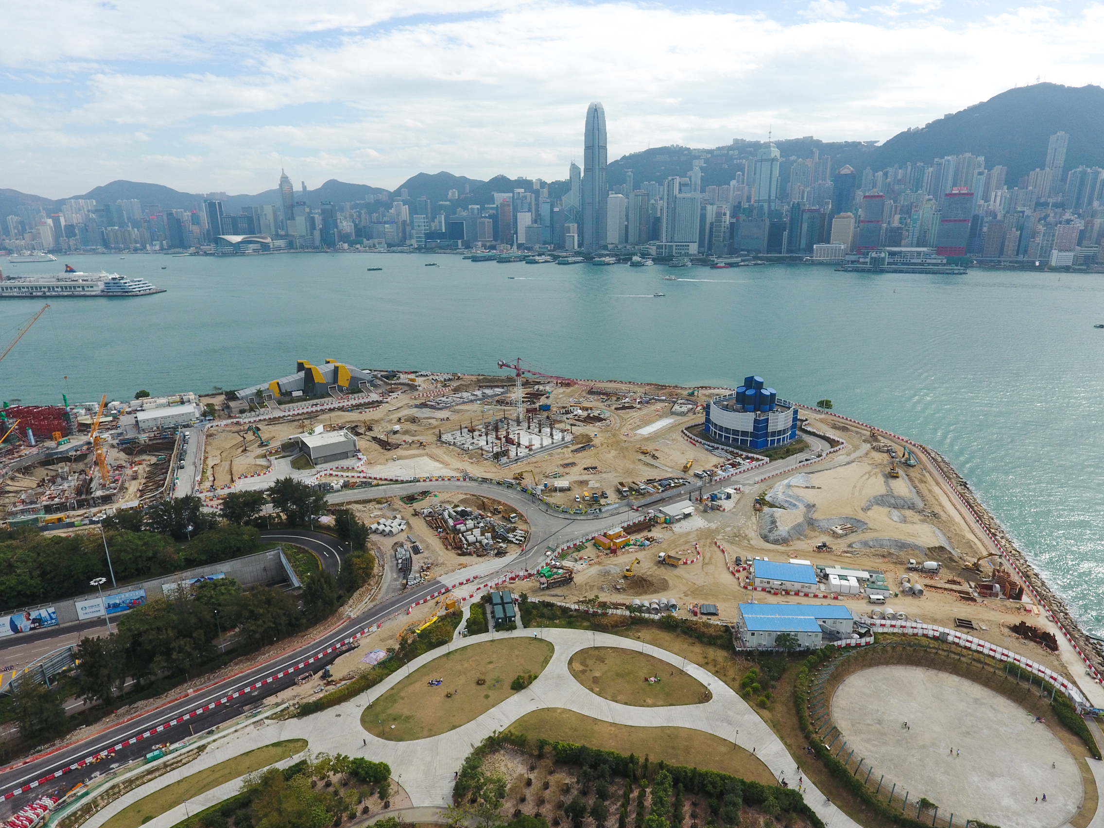 West Kowloon Park site